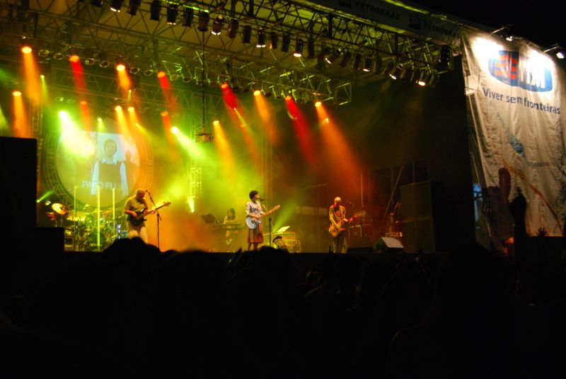 Patu Fu, brazilian band.